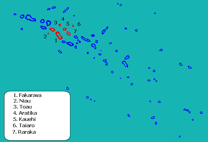 Mapa de localització de la comuna de Fakarava a l'arxipèlag Tuamotu, Polinèsia Francesa.